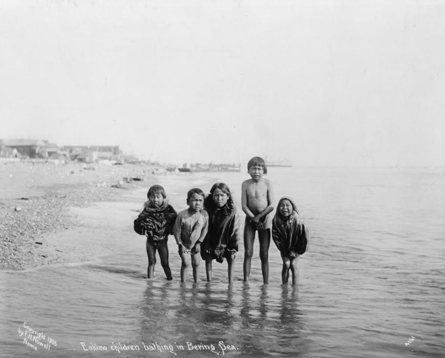 Eskimo children bathing in Bering Sea